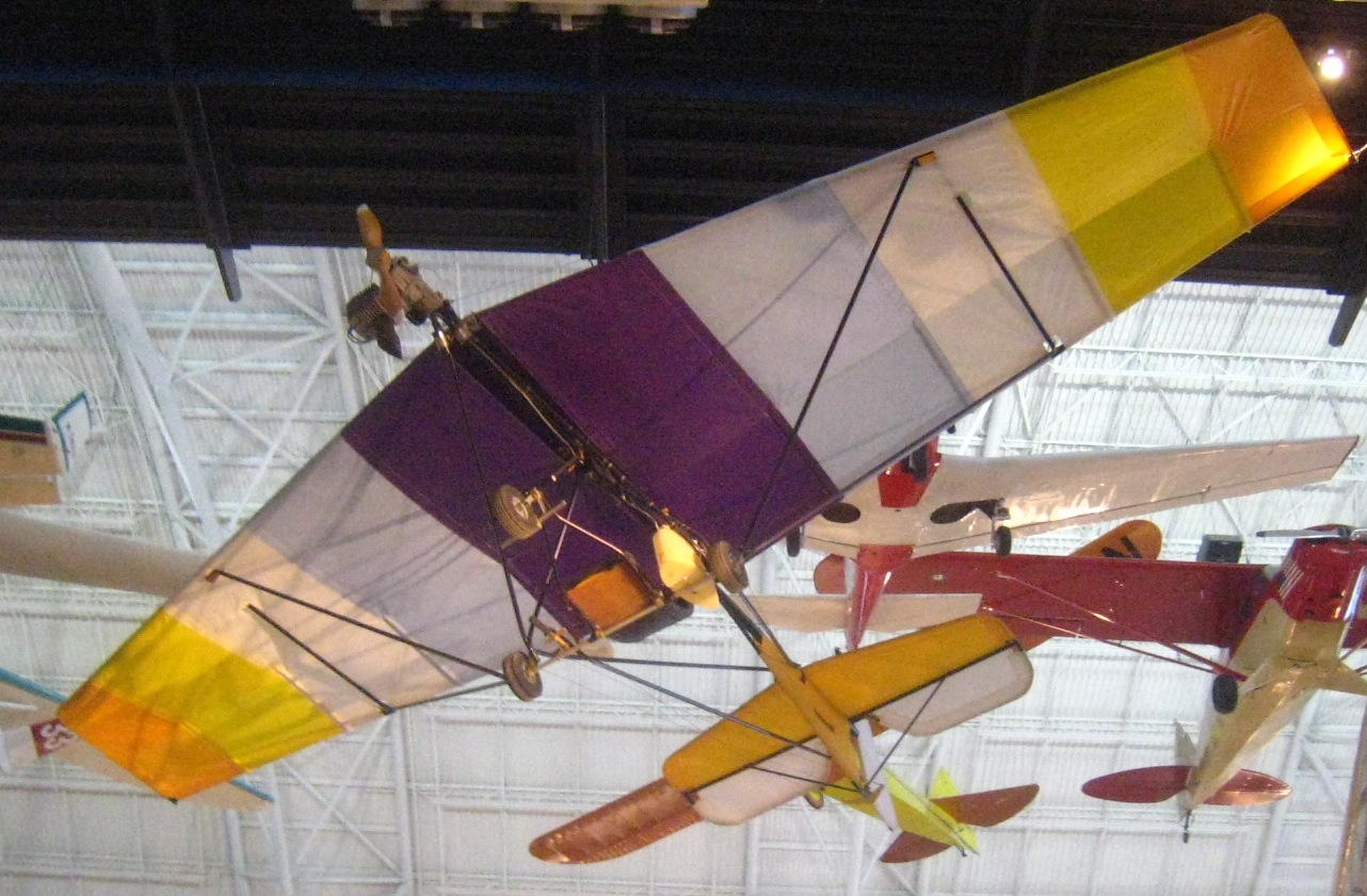 Weedhopper JC-24C